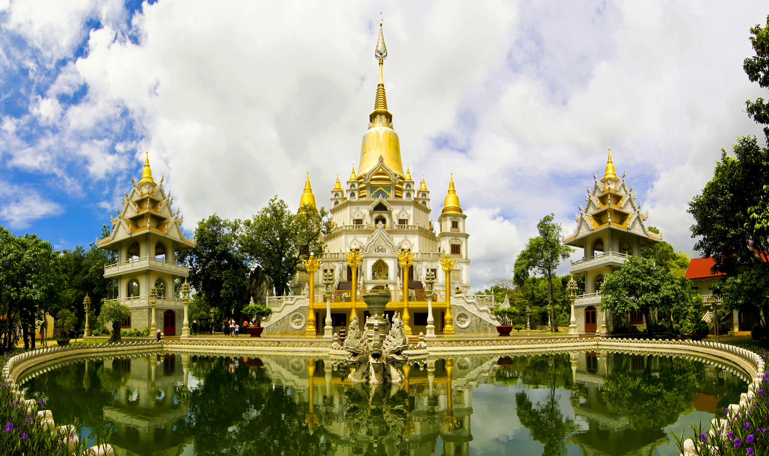 chùa Bửu Long quận 9